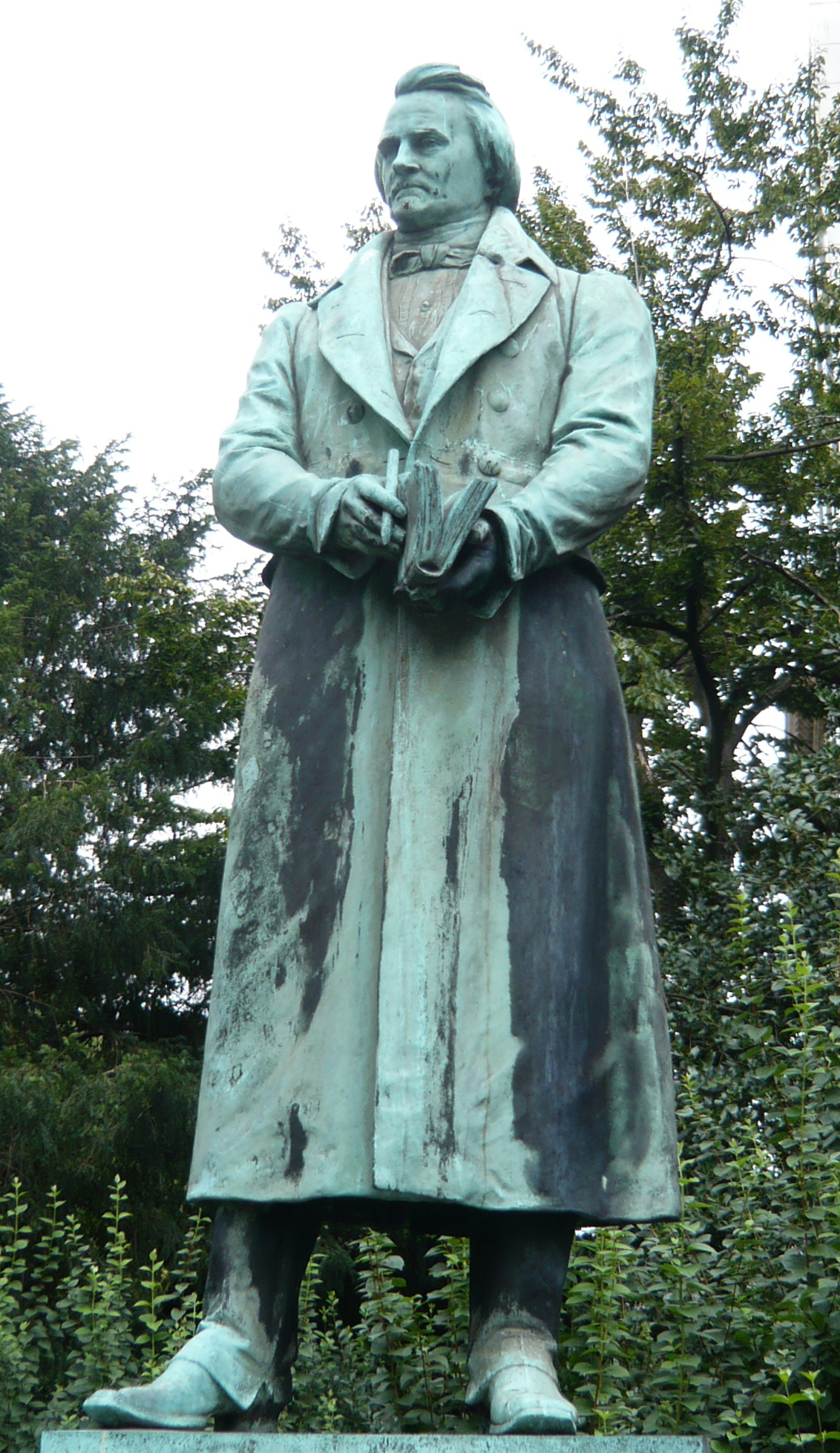 Bronzestatue Karl Leberecht Immermann von Clemens Buscher: 1901 Aufstellung der 500 kg schweren Bronzestatue in der Frontnische des Düsseldorfer Stadttheaters (1936 von den Nationalsozialisten entfernt), 1940 Aufstellung der Immermann-Bronzestatue im Hofgarten in der Goltsteinstraße in Düsseldorf